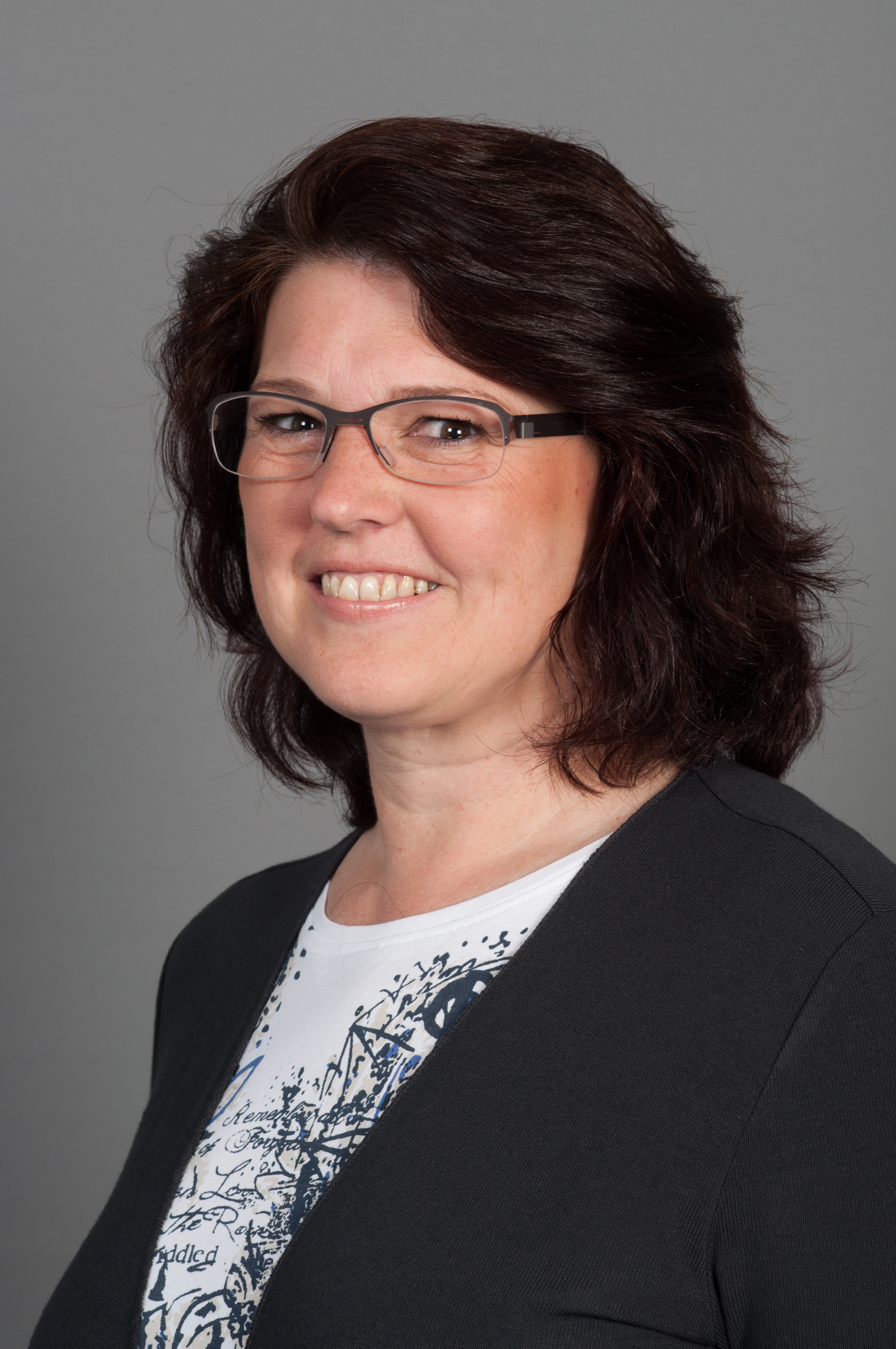 Ute Vogt (SPD), MdB